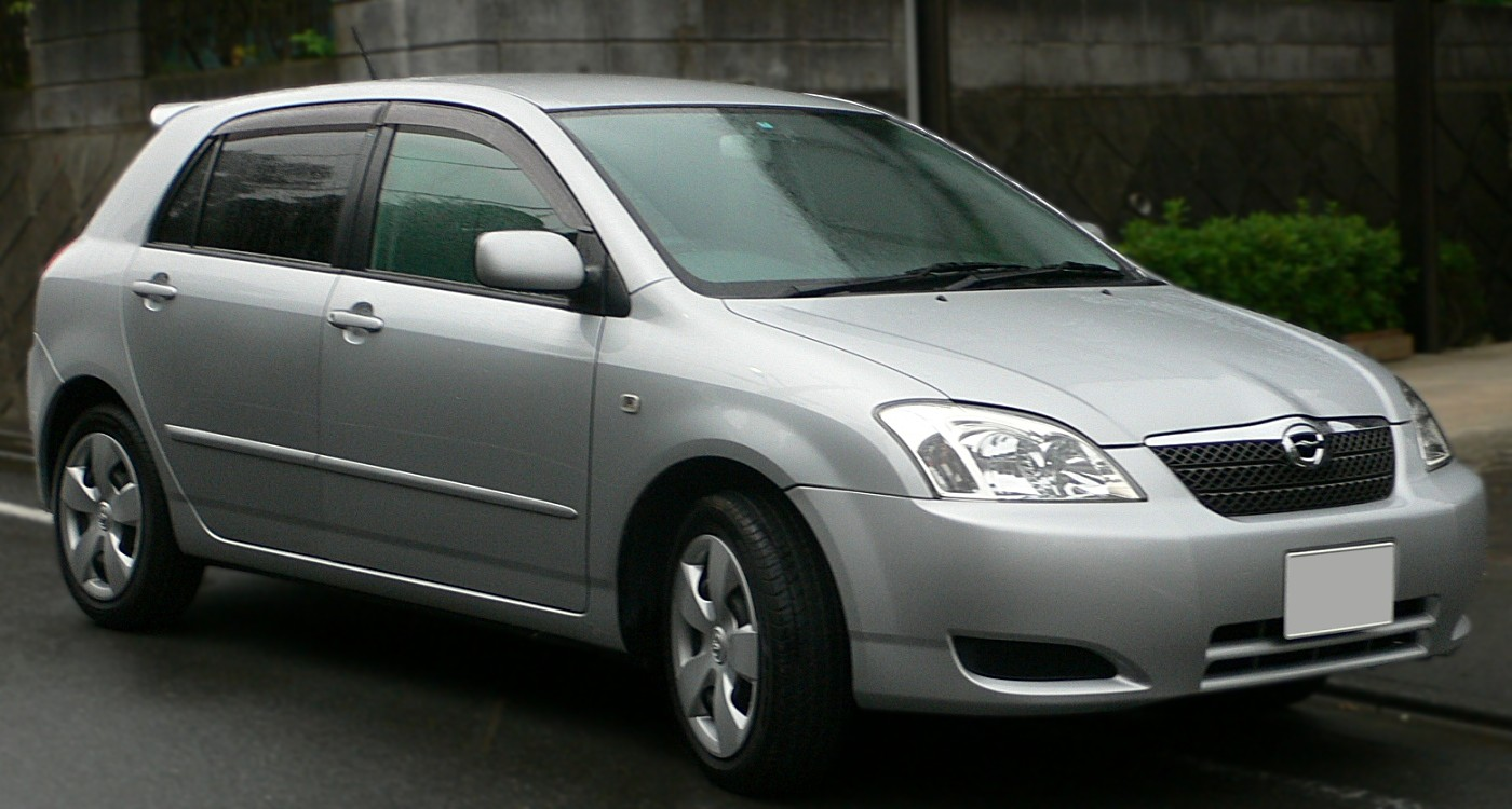 Toyota_Corolla-Runx (2002 - 2004)